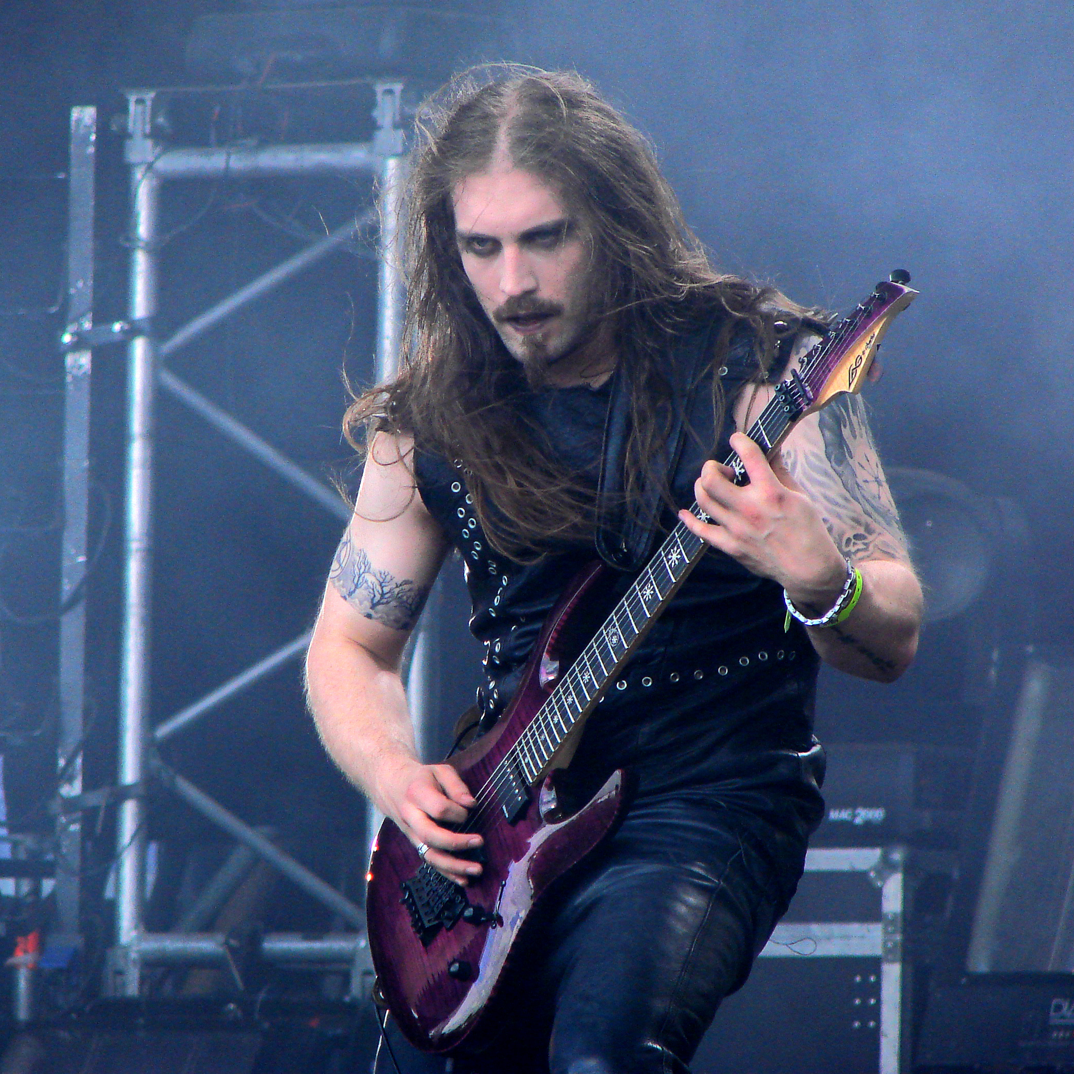 Cradle of Filth au Hellfest 2009: Charles Hedger à la guitare.